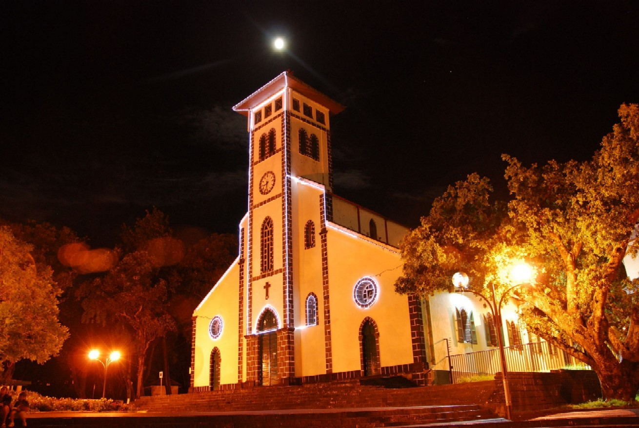 L'église Saint-François de Sales, au Tampon.